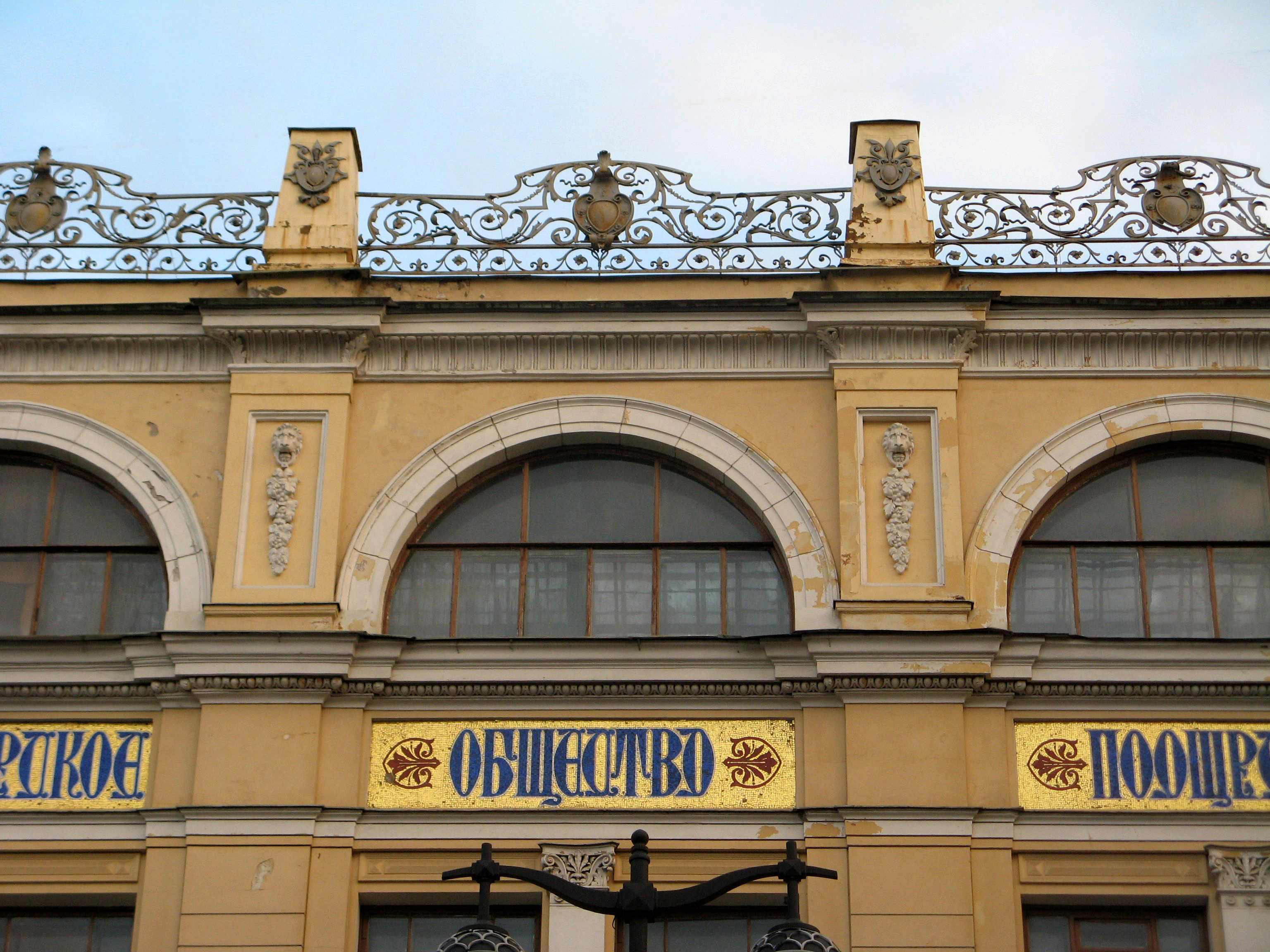 Дом Общества поощрения художеств с дворовыми флигелями (Санкт-Петербург и Лен.область, Санкт-Петербург, Большая Морская улица, 38, р. Мойки наб., 83)